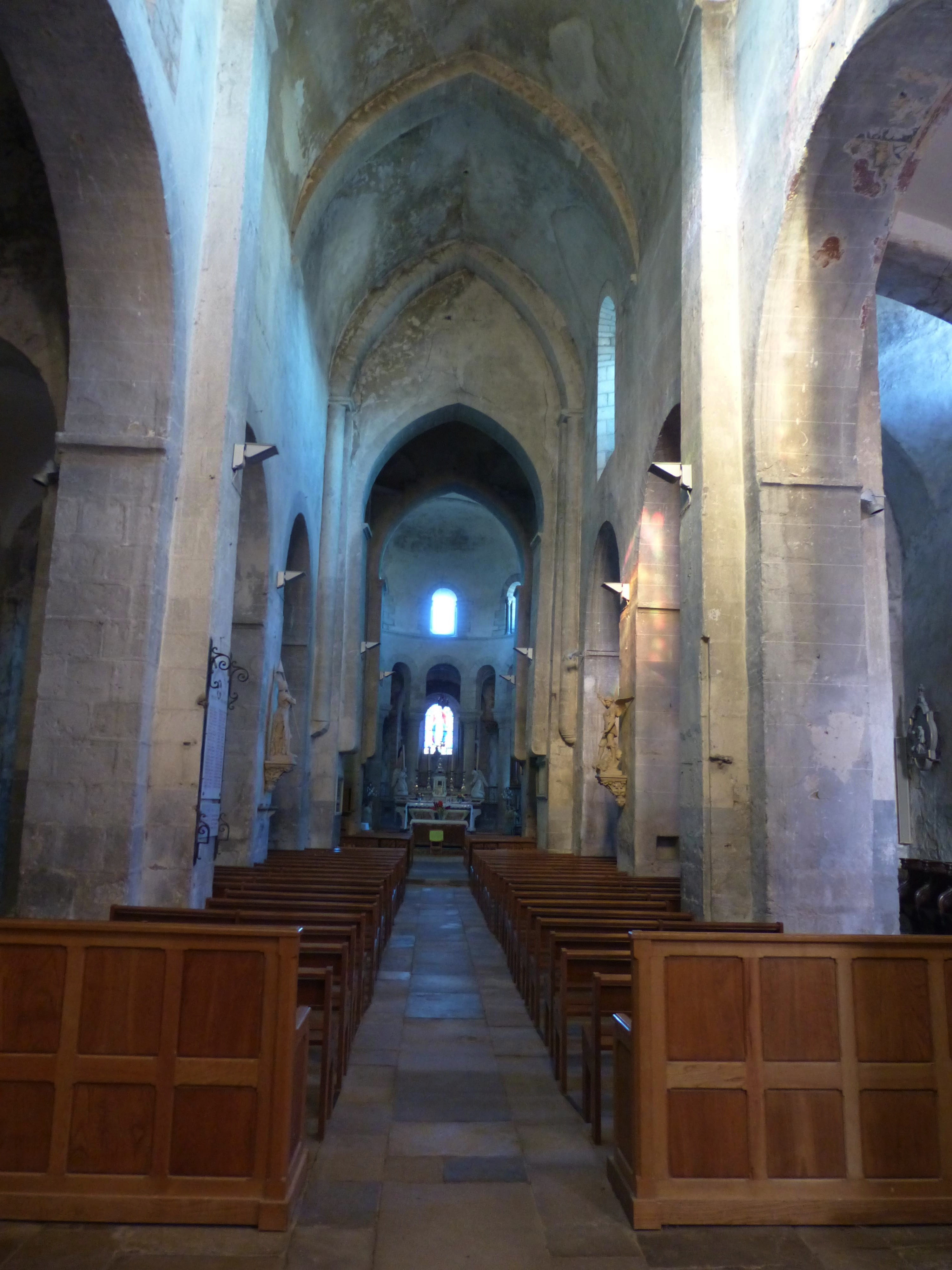 Église Saint-Martin d'Artonne, Puy-de-Dôme (France).Nef.